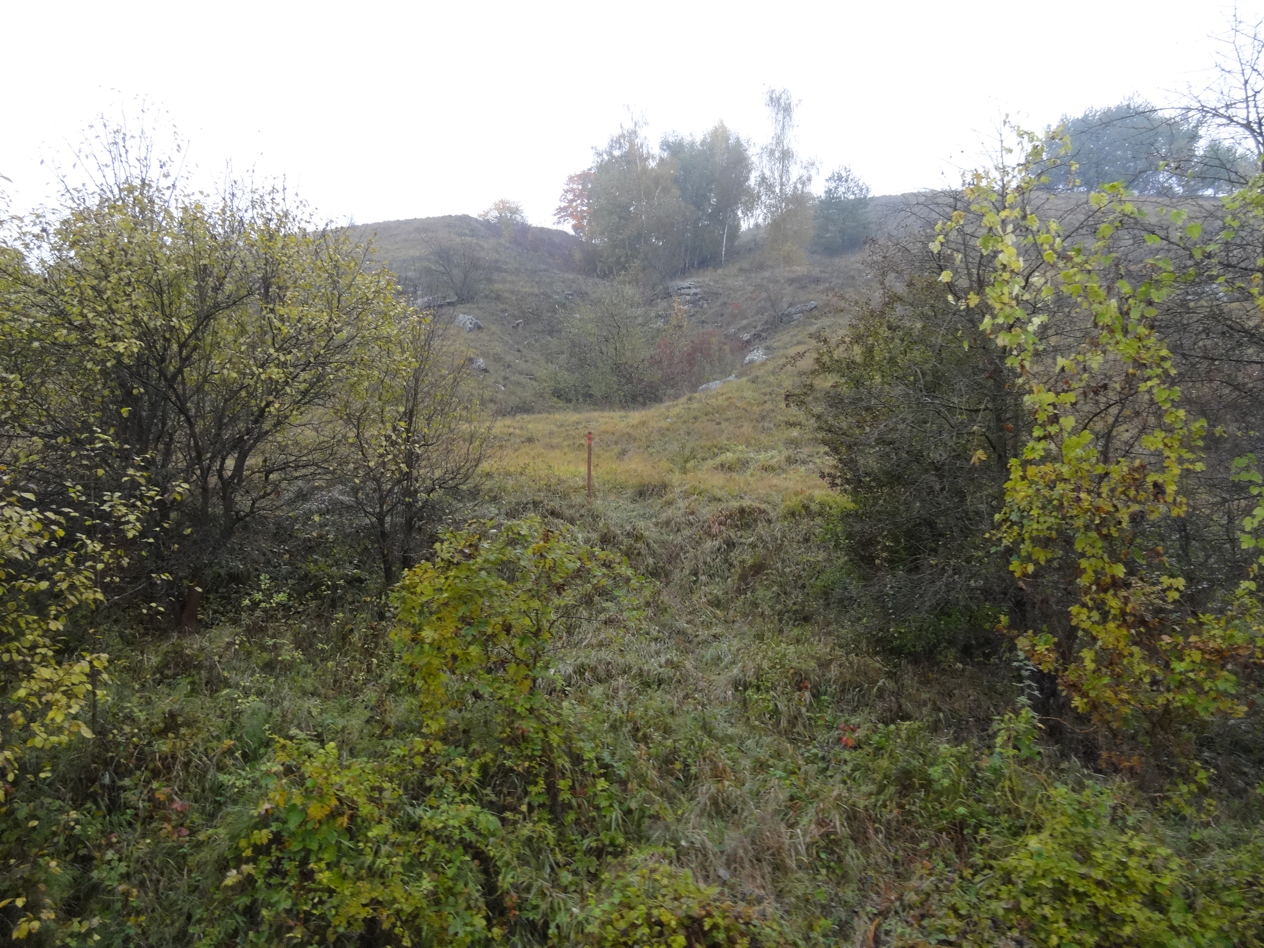 PP Na Dlouhé stráni (fotografováno z Podřipského motoráčku)